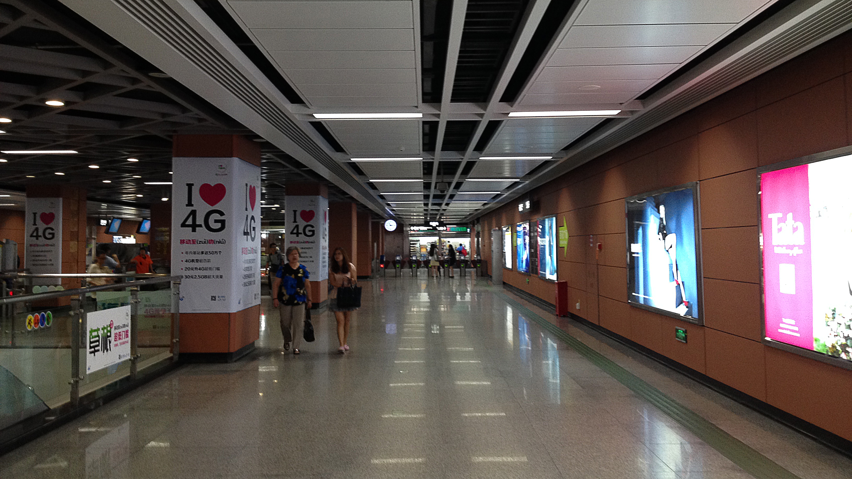 广佛地铁祖庙站站厅